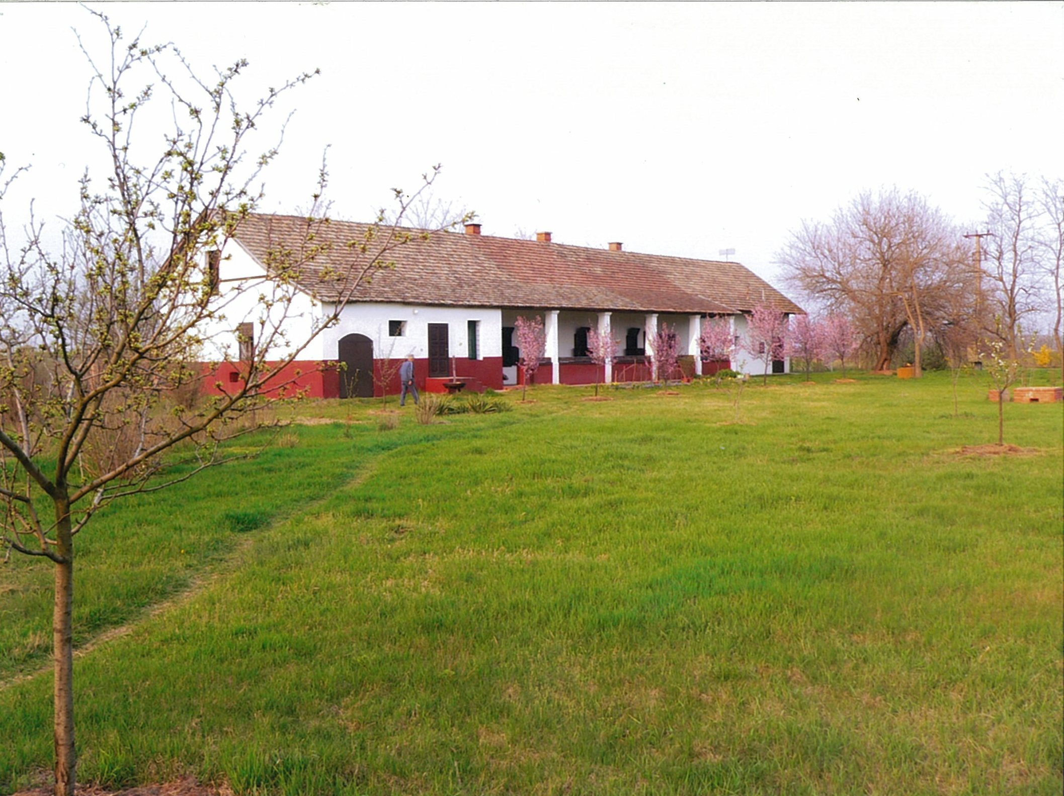 Piroska János birtoka, Csongrád